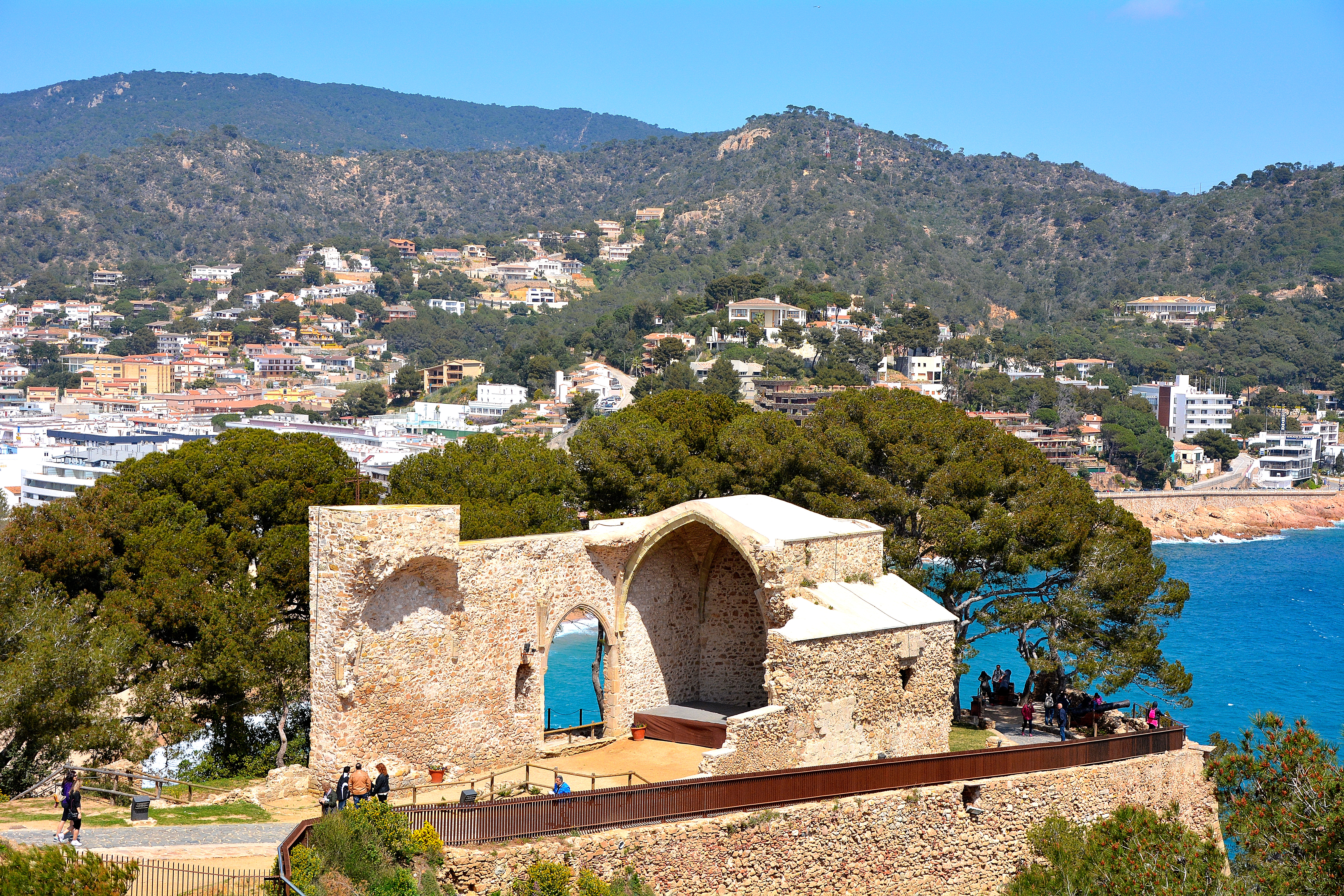 Massís de les Cadiretes- vista de Tossa y la Església vella de Sant vicenç tossa de Mar This is a photography of a Site of Community Importance in Spain with the ID: ES5120013. Natura2000 entry, EEA entry